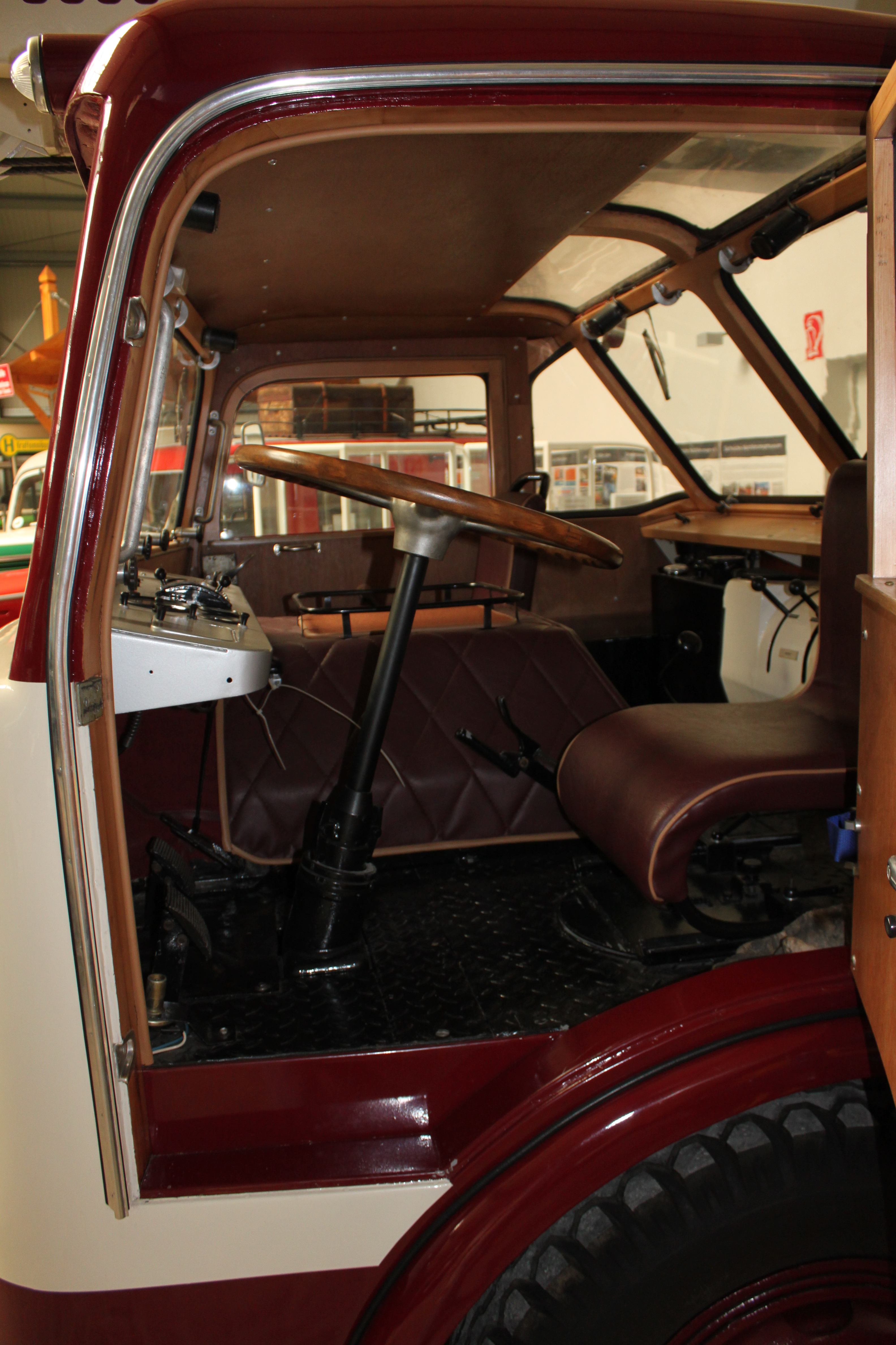 Fahrerkabine ADK III/3 Puma